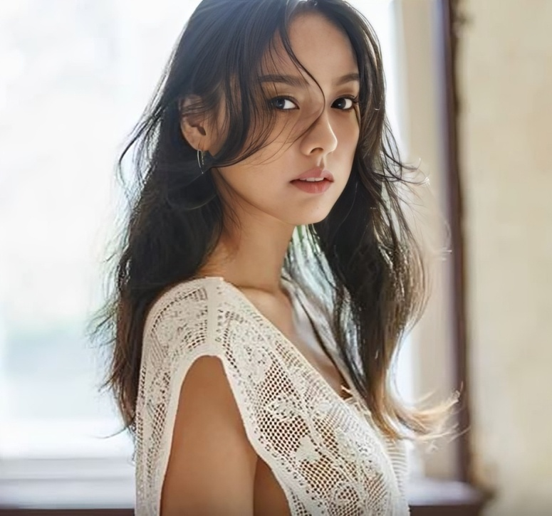 소울을 느끼며 몸을 움직인다. 아름다운 그녀의 이름은 이효리.